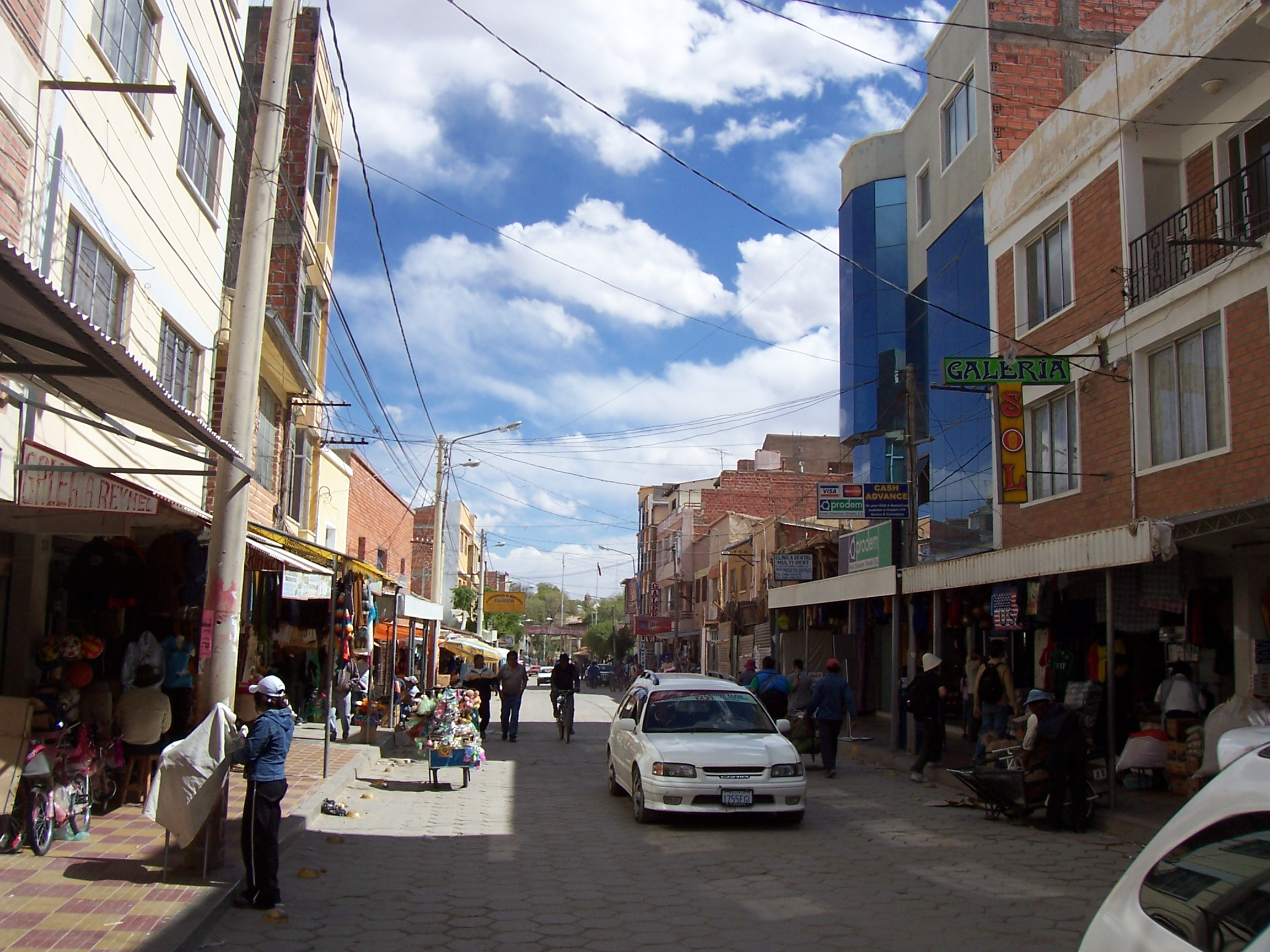 La Ruta 14 en su paso por la ciudad de Villazón, Bolivia.